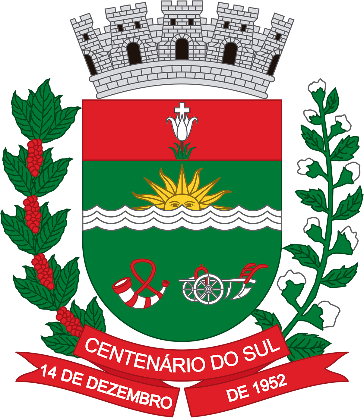 Brasão do Município de Centenário do Sul/PR